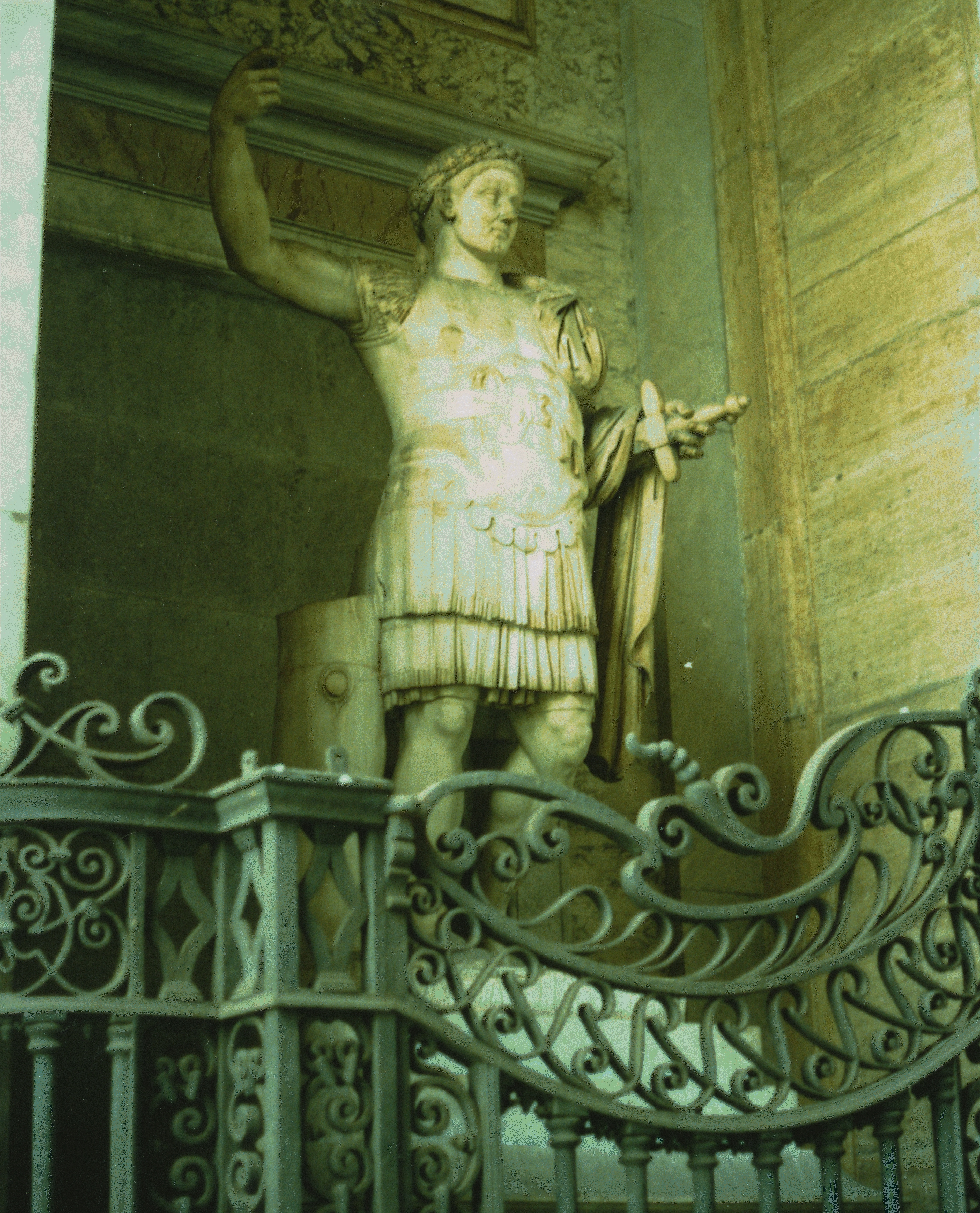 Socha Konštantína Veľkého sa nachádza v predsieni Lateránskej baziliky v Ríme. Photo taken by Jozafát Vladimír Timkovič, OSBM